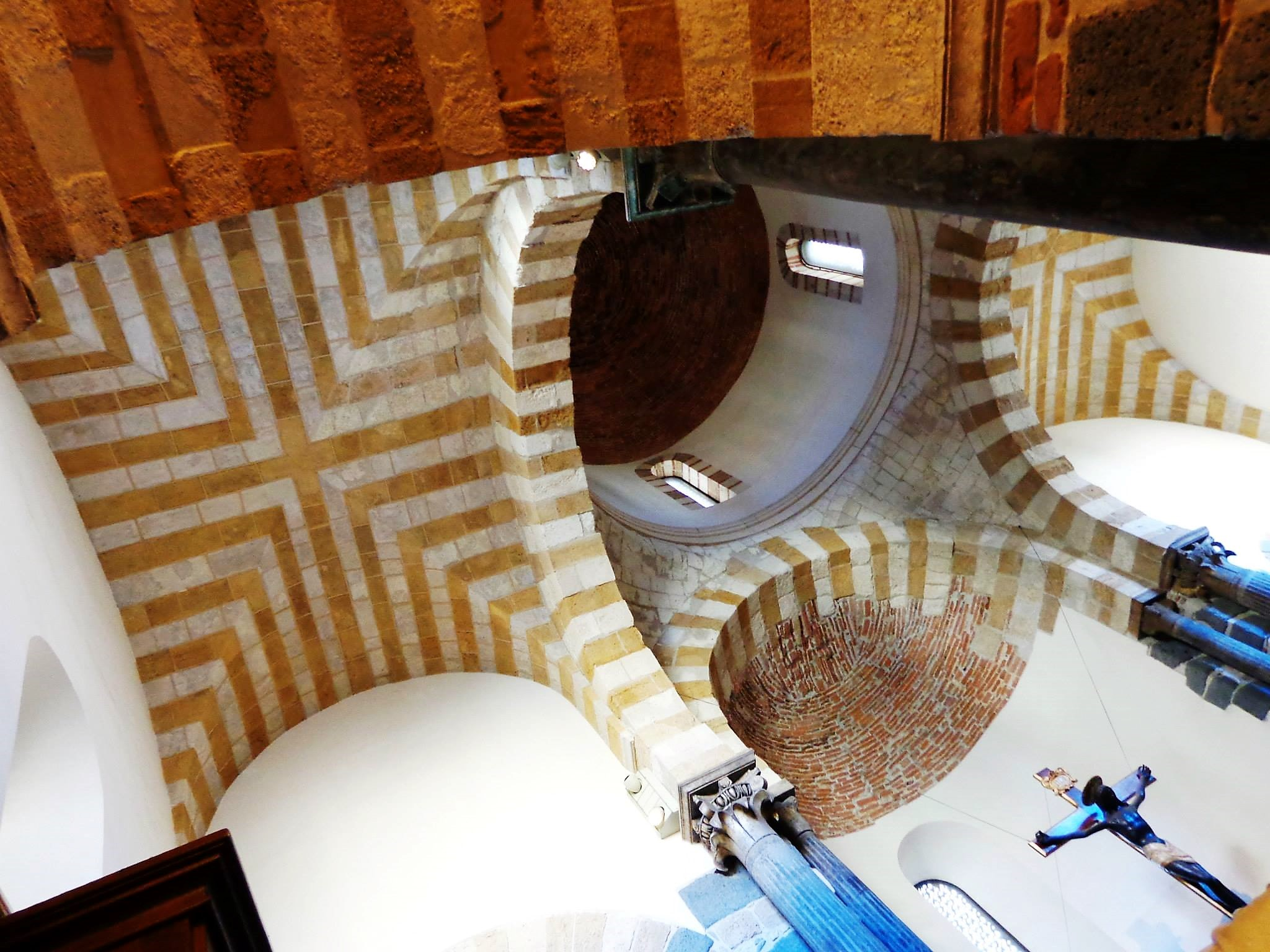 Chiesa dei Catalani